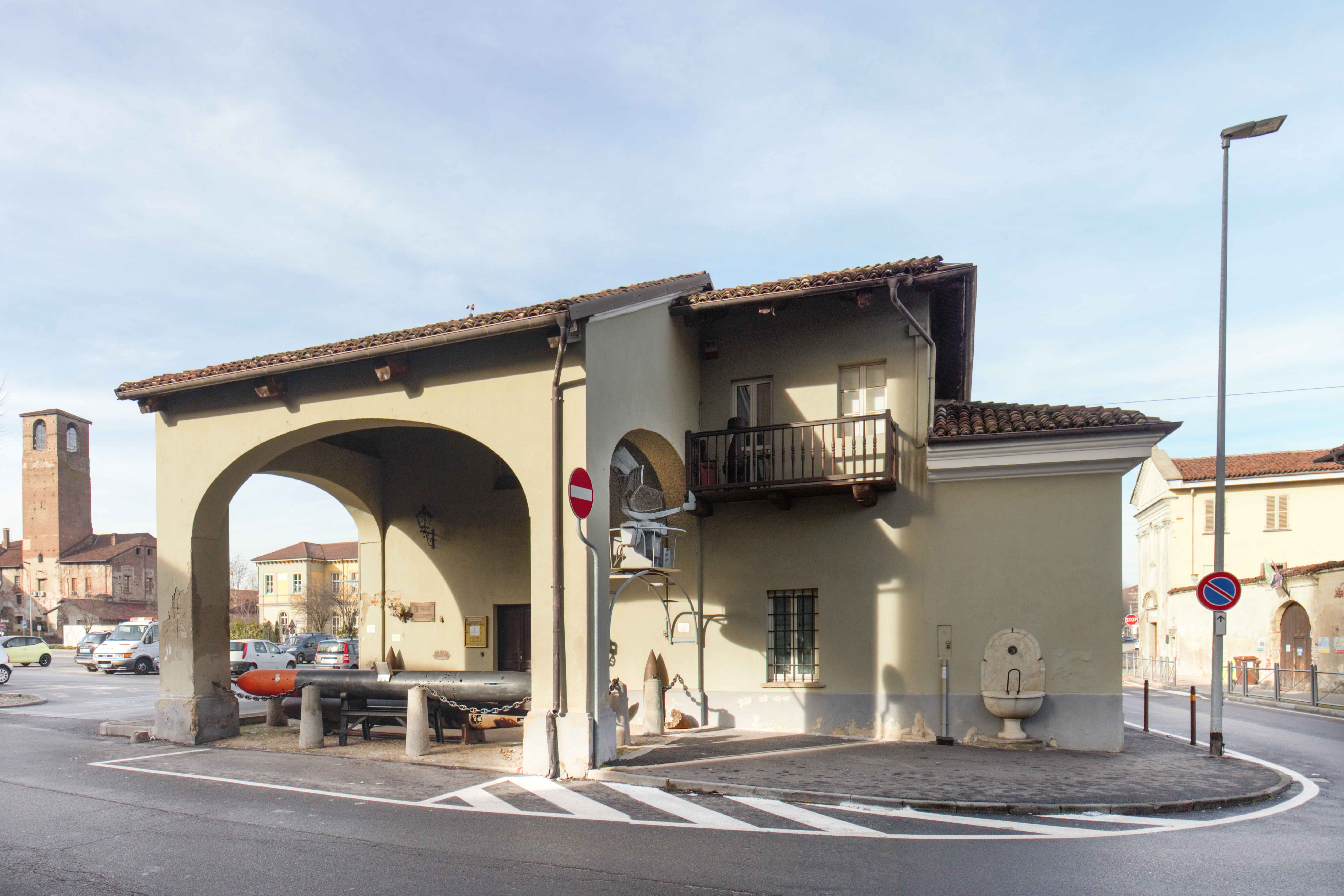 Museo Civico Navale di Carmagnola - ex casotto del Peso This is a photo of a monument which is part of cultural heritage of Italy.